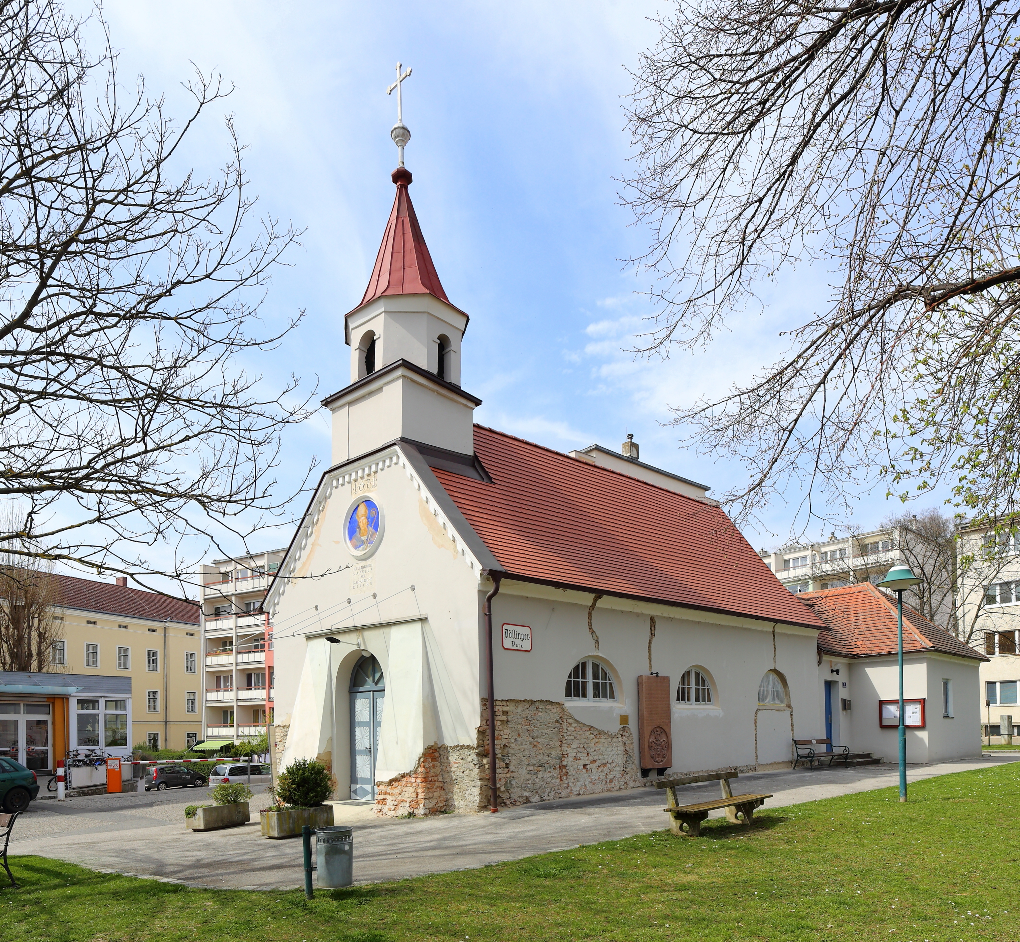 Südostansicht der Altkatholischen Kirche in der niederösterreichischen Stadt Krems an der Donau, auch als Willibrordkapelle bezeichnet.Der schlichte Bau mit Satteldach und Dachreiter ist mit 1671 datiert und war früher die Friedhofskapelle. Unter dem Giebel befindet sich ein gemaltes Medaillon mit dem hl. Willibald.